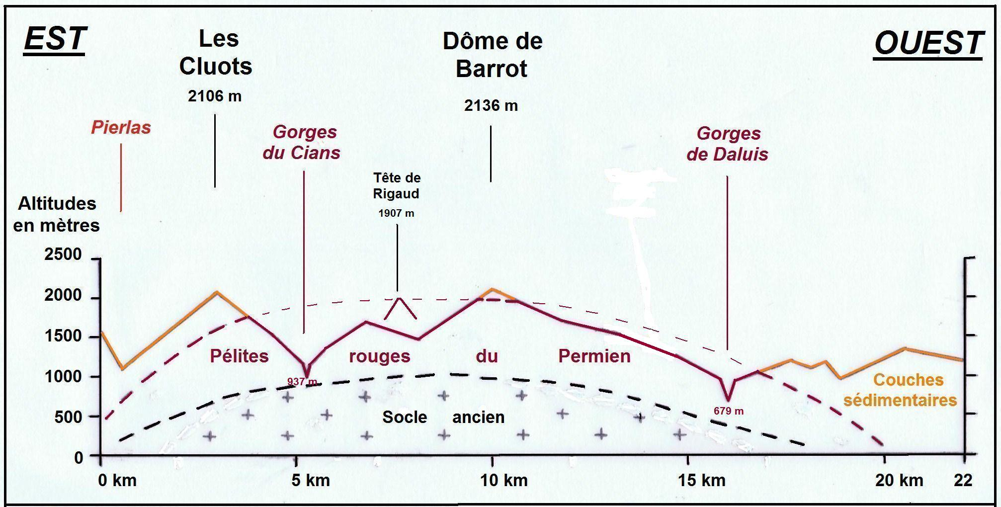 Coupe schématique du "Dôme de Barrot" illustrant les analyses qu'en ont faites - notamment - le géographe Raoul Blanchard (pages 199 et suivantes du Tome V de "Les Alpes occidentales", Paris, 1949) et la géologue Magali Rossi (coupe géologique de sa figure n° 8 des pages 109 à 134 du tome 2010/2011 des "Mémoires" de l'Institut de préhistoire et d'archéologie Alpes Méditerranée, directeur de publication Claude Salicis, Nice, 2011). Mise en forme réalisée le 31/01/2013 par André Payan-Passeron, diplômé d'études supérieures de géographie, à partir des cartes IGN au 1/25.000 et de la carte géologique "Puget-Théniers" au 1/50.000. Structure géologique simplifiée d'EST en Ouest du "Dôme de Barrot" : le socle ancien est recouvert, sur près de 1000 mètres, par une masse de pélites rouges qui ont été dégagées, par les érosions, des couches sédimentaires encore présentes sur les sommets et, surtout, en périphérie.